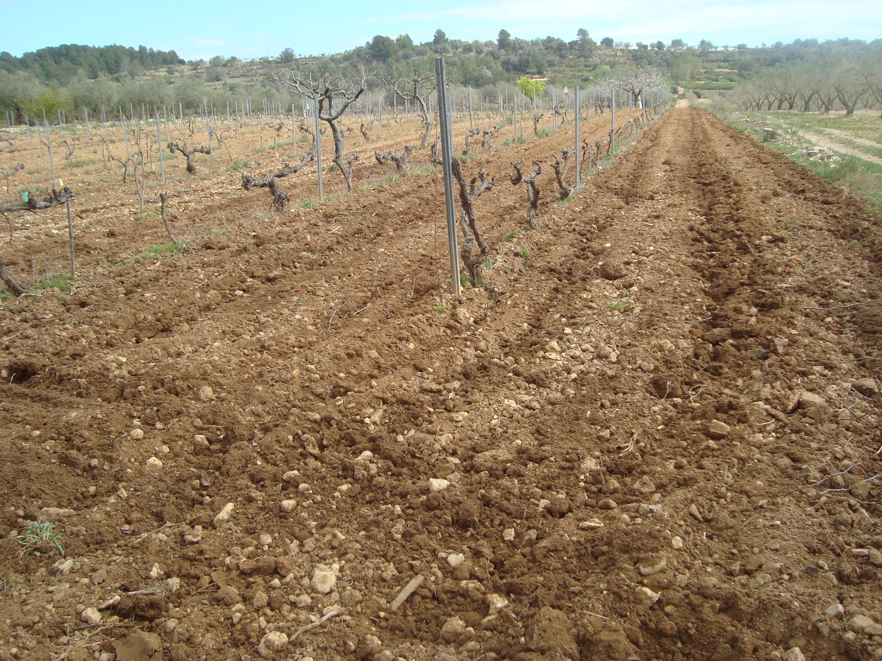 Campo de Viña, agricultura de secano (La Torre d'en Doménec)